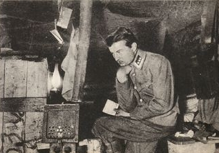 Fotograf Stanisław Mucha w czasie jego służby w Legionach Polskich.